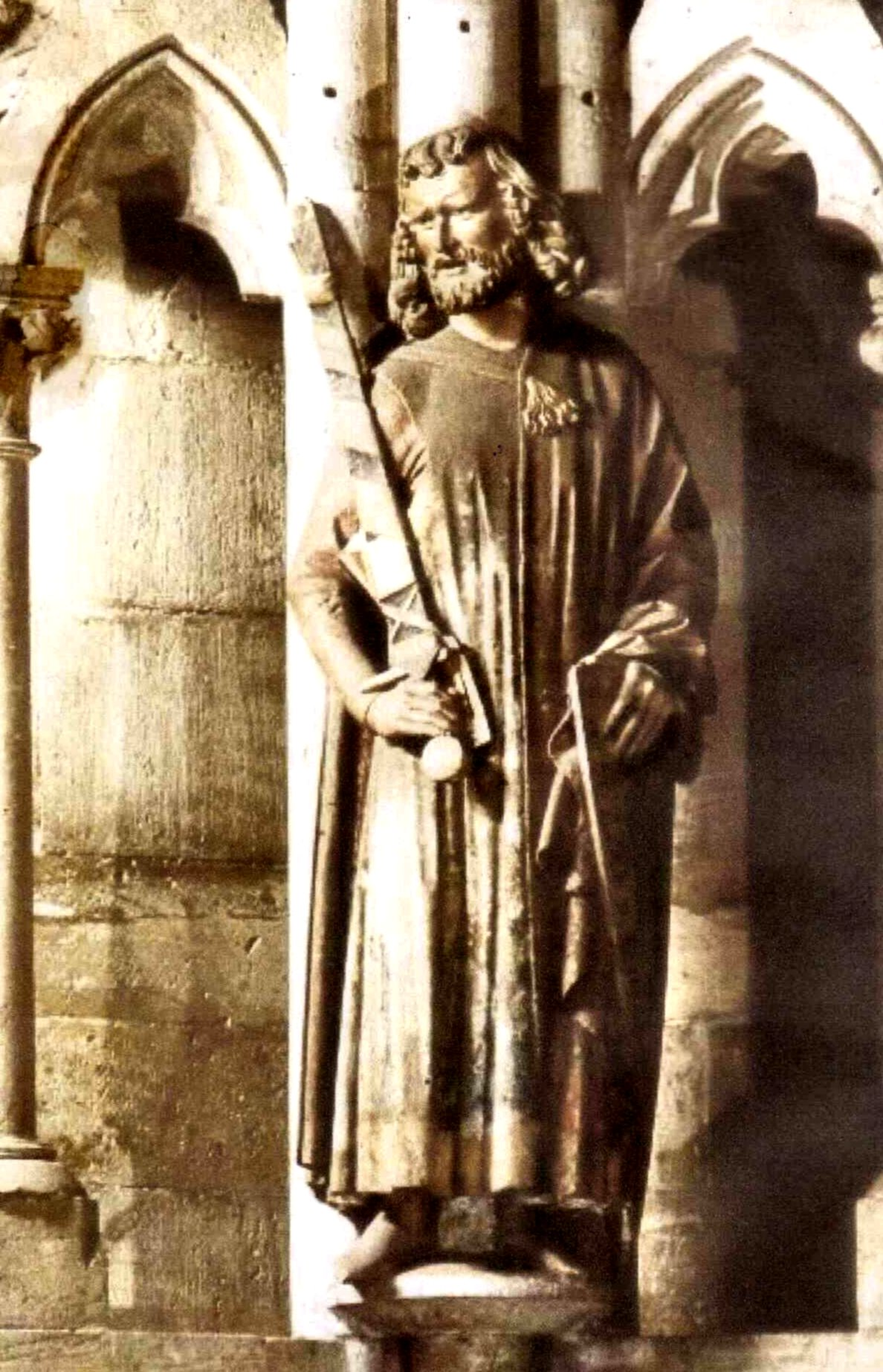 David Rubin Privatbesitz Sizzo Naumburger Dom Stifterfigur